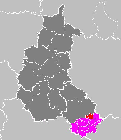 Maps of arrondissements and cantons of France: Arrondissement de Langres - Canton de Val-de-Meuse.PNG